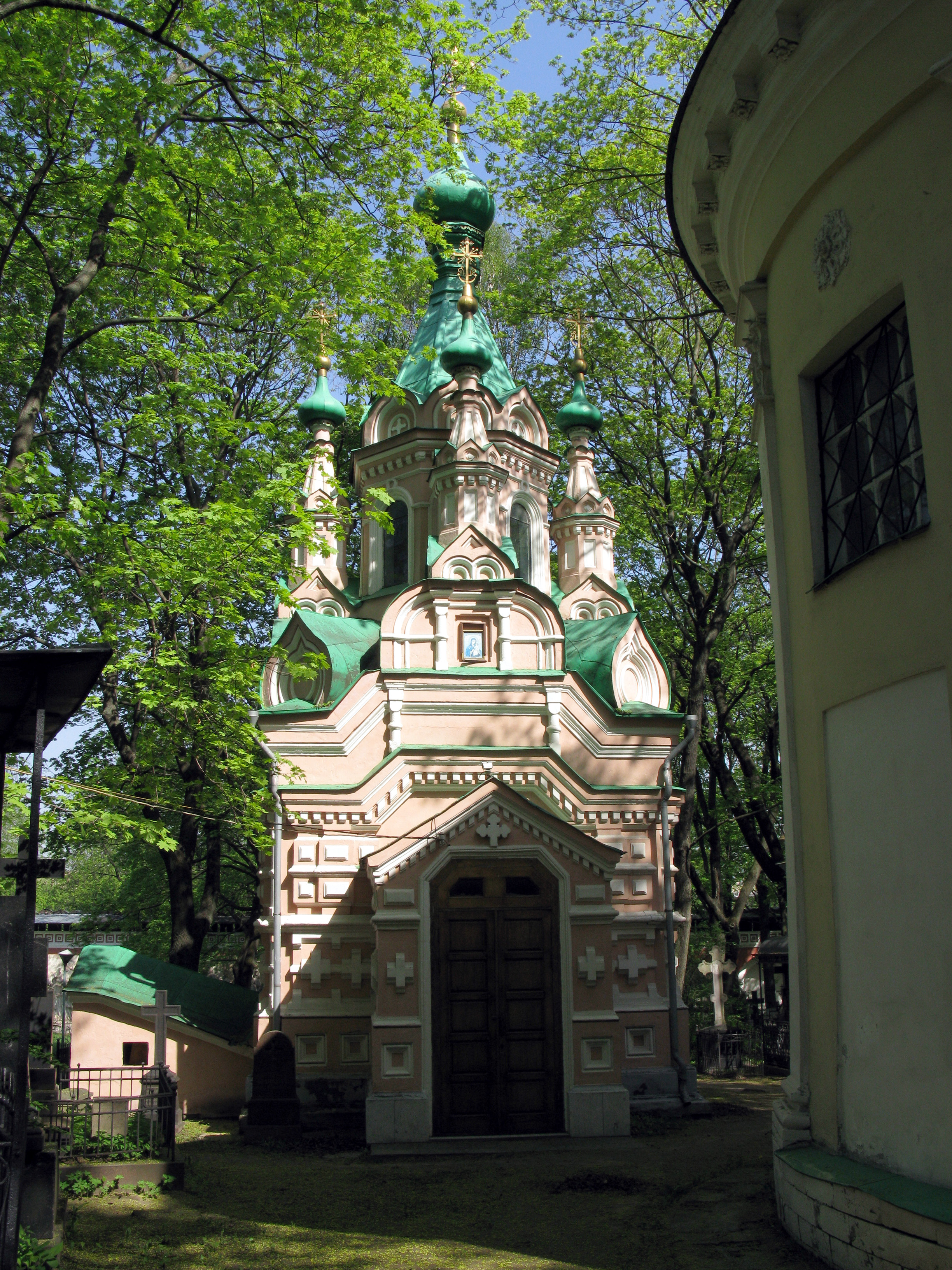 Храм Иоанна Лествичника Донского монастыря (усыпальница Терещенко), 1898 год